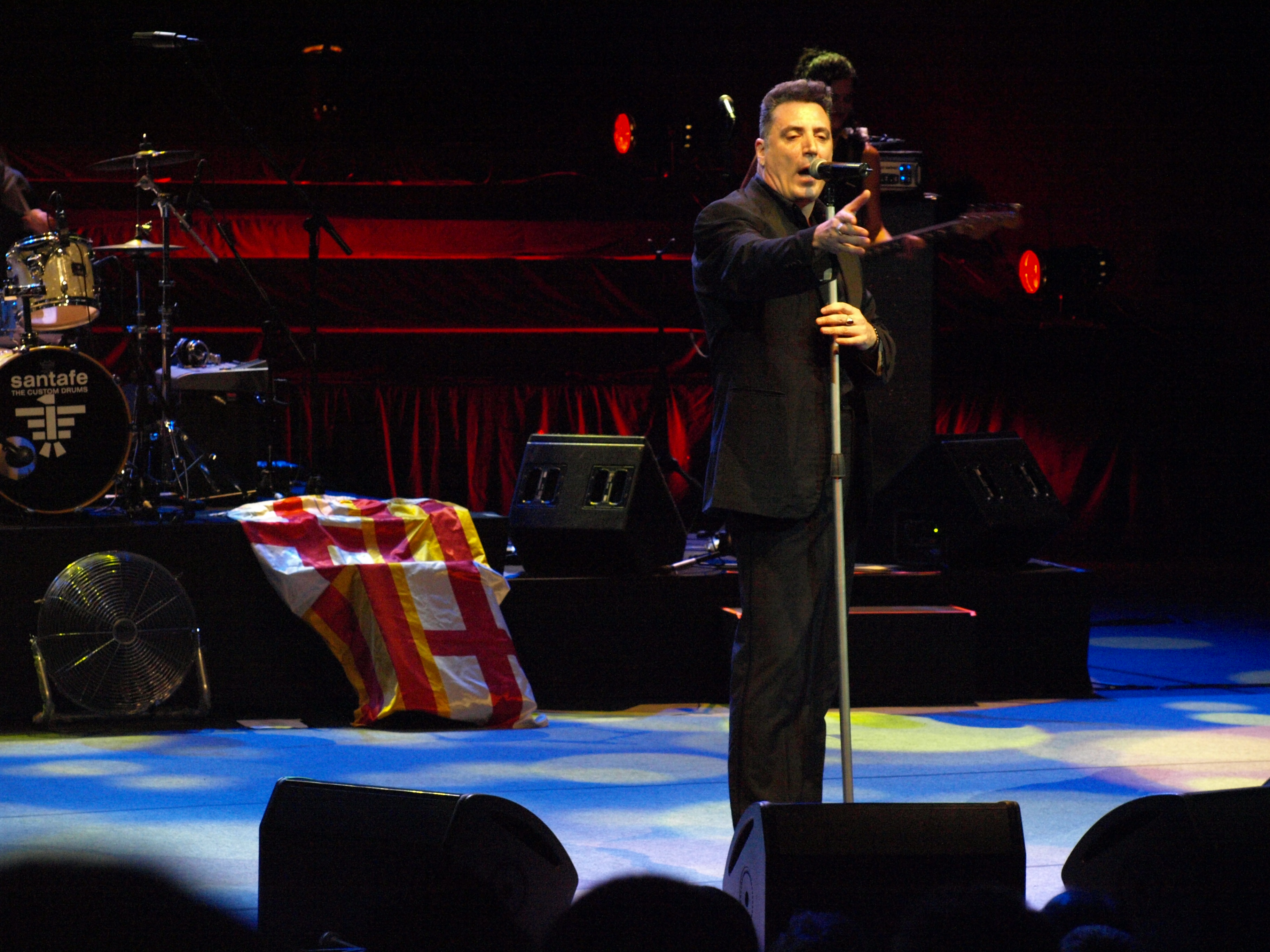 Loquillo durante un concierto en el Auditorio de Barcelona en septiembre de 2008 en el marco de la gira de presentación de su disco Balmoral.